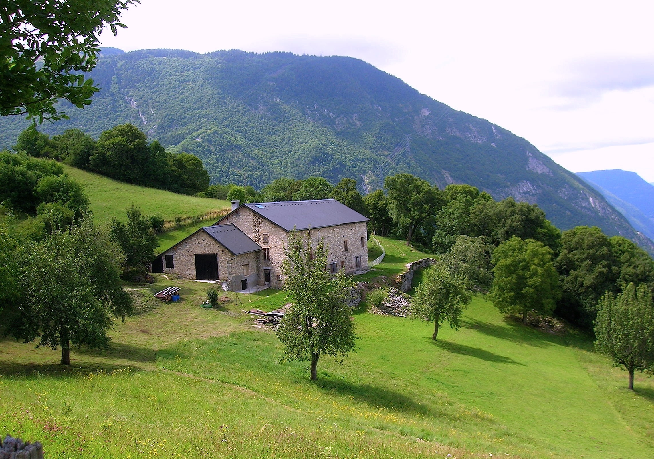 Ferme Durant, La Poya, Fontaine, Isère, Rhone Alpes, France.